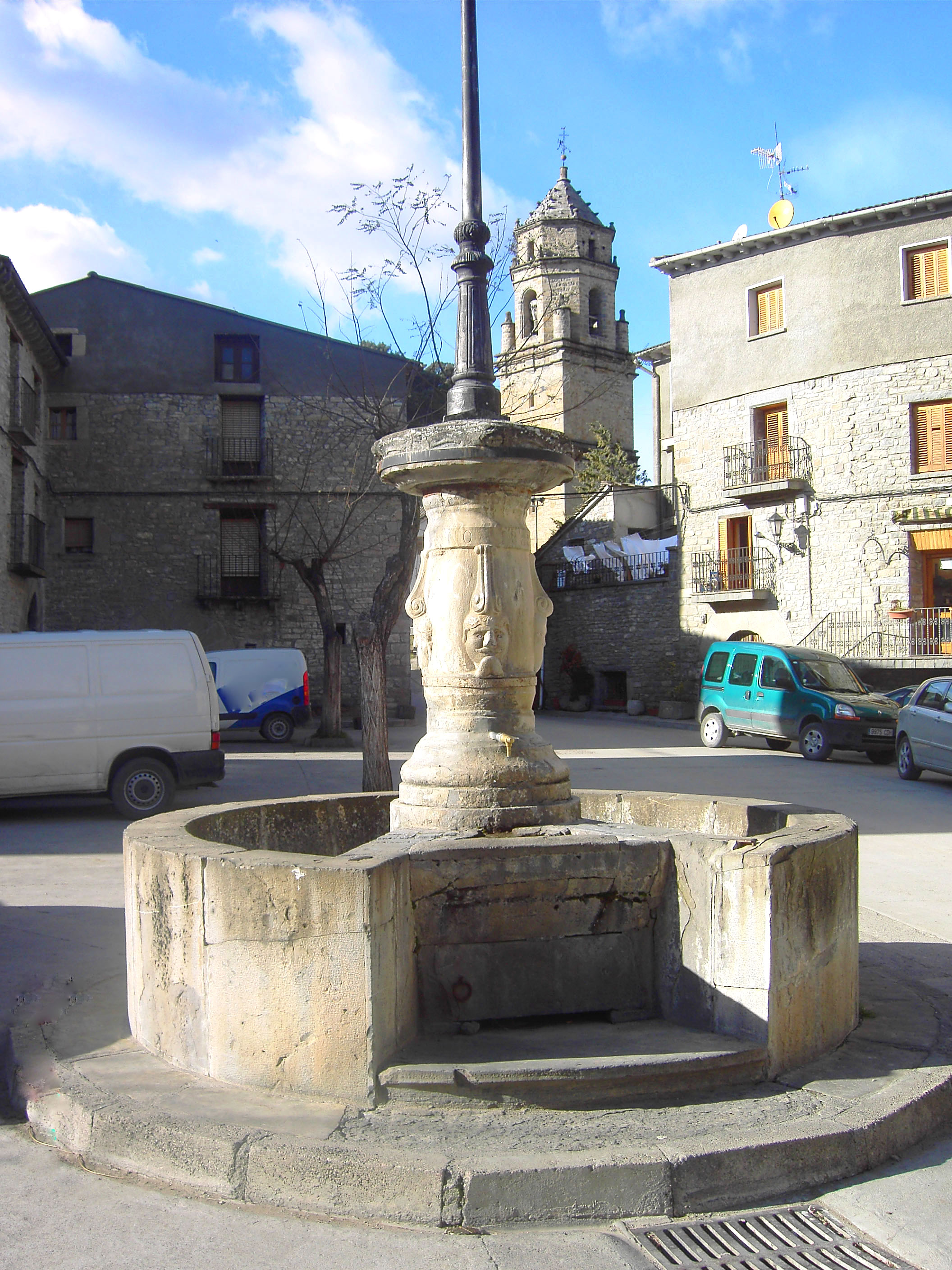 Fuente de la Plaza Mayor, en Labuerda